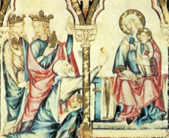 Adoração dos Reis Magos, miniatura do códice de Escorial das Cantigas de Santa Maria. Cantiga Des oge mais quer'eu trobar.